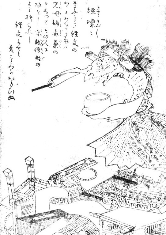 Kyōrinrin (経凛々) from the Gazu Hyakki Tsurezure Bukuro (百器徒然袋)